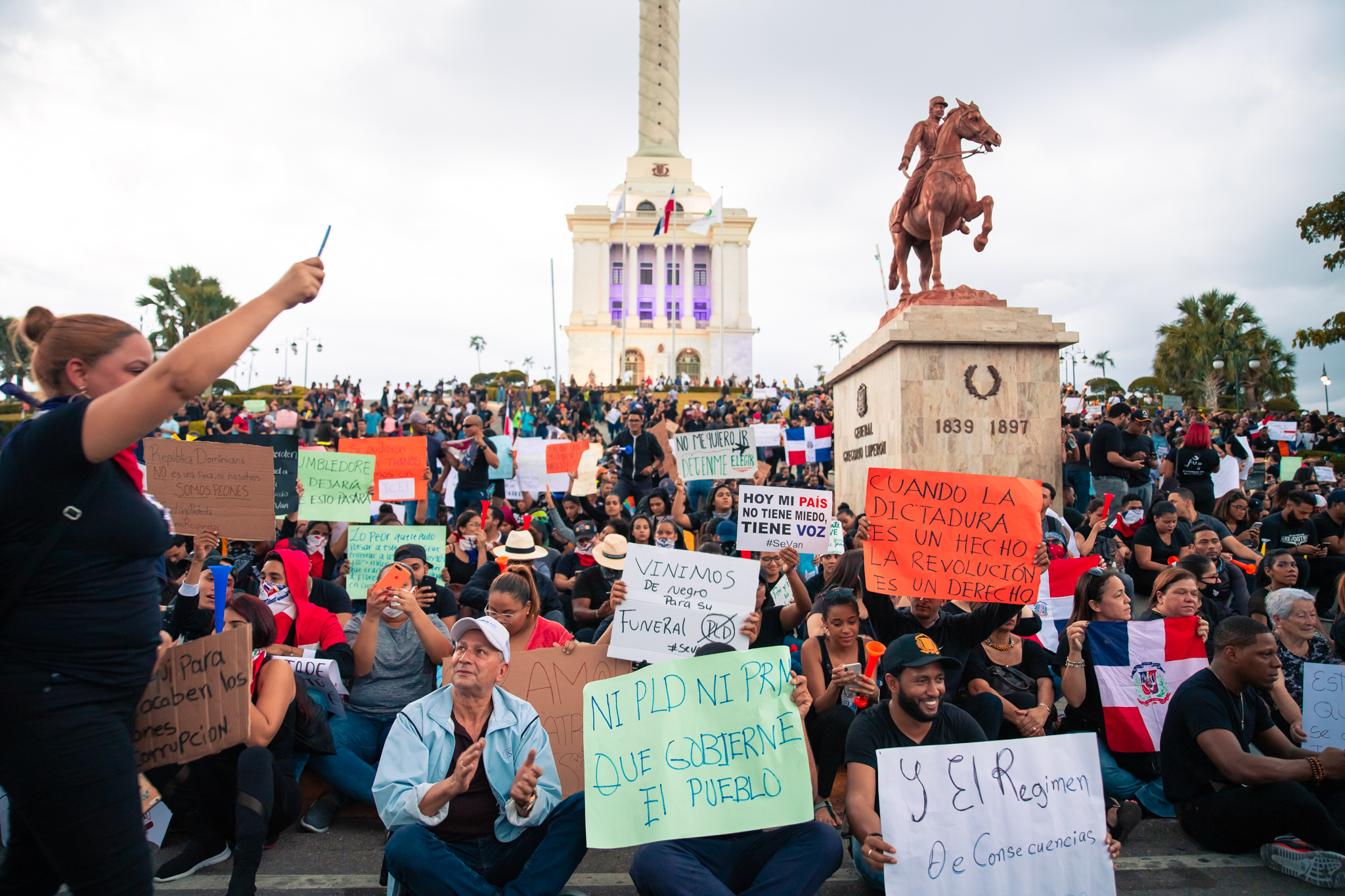 Segundo día de protestas en el Monumento a los Héroes de Santiago y tercer día de protestas en toda la República Dominicana.